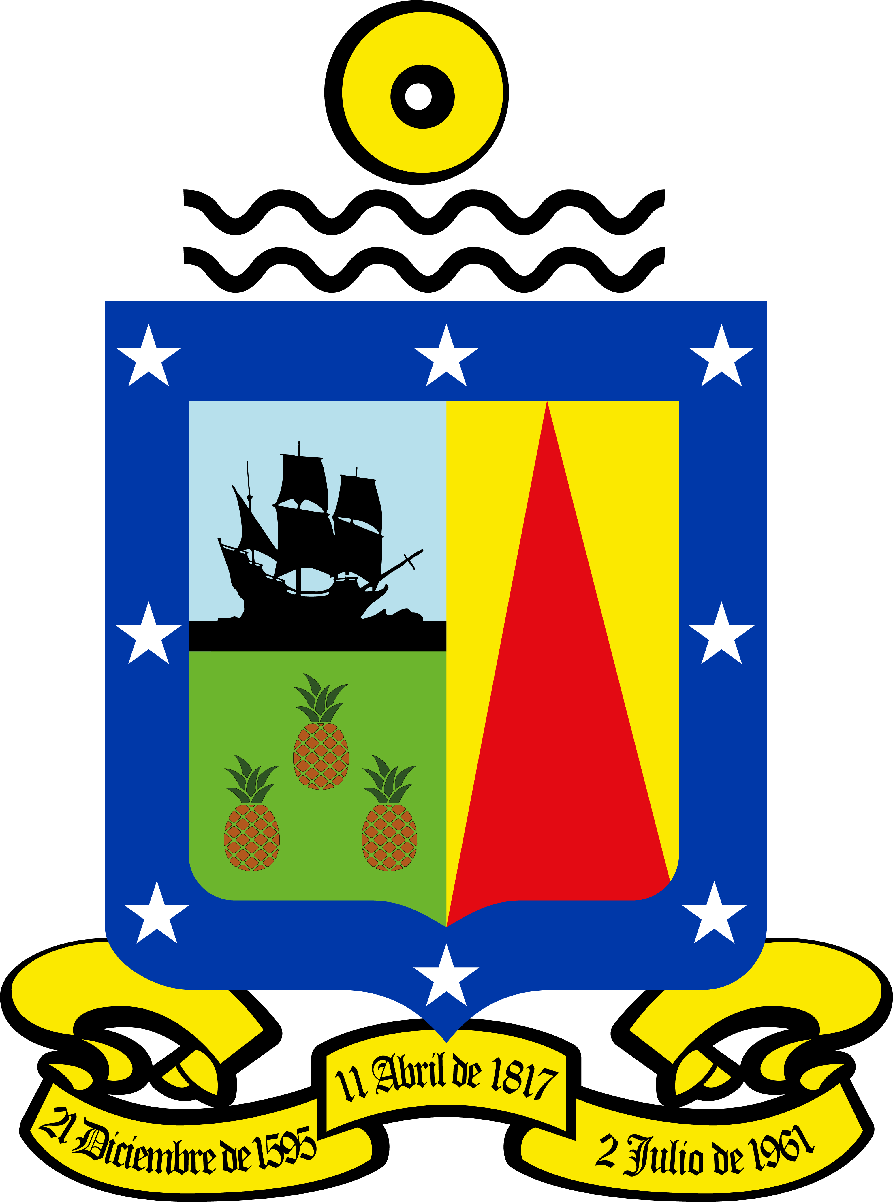 Escudo del Municipio Caroni El escudo municipal se encuentra rodeado por una bordura azul con ocho estrellas; dividido por dos cuarteles principales: El de la izquierda superior contiene un barco de velas desplegadas, que representa uno de los que hacia el comercio de indias en el siglo XVIII. En la parte inferior del mismo cuartel, tres piñas de nuestro continente que representa, fruto descubierto y convertido en símbolo de la América tropical, por imagen de los europeos. En el segundo cuartel se representan el presente y porvenir. El triángulo con forma de desgarrón color rojo significa la lucha, el esfuerzo humano por convertir la riqueza minera y utilizar la energía del país y ponerla a producir. El escudo coronado sobre las líneas onduladas representan dos ríos, el Orinoco y el Caroní, la piedra redonda de molino, simboliza el nombre del Padre de la Patria, el estado y la primera máquina humana ampliamente productiva. En la parte inferior esta una cinta color amarilla donde identifica las fechas más importantes de la vida de Santo Tomé de Guayana.